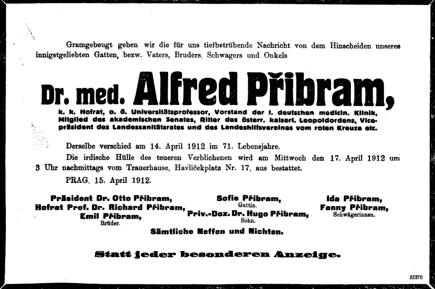 Todesanzeige für Alfred Pribram (1841-1912)